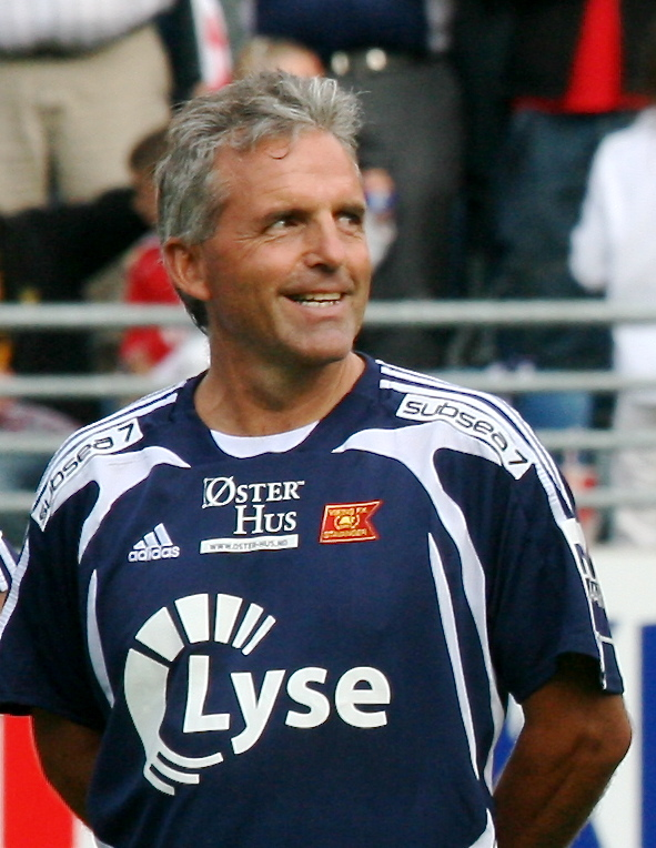 Isak Arne Refvik under kampen til Viking All Stars mot Liverpool Legends 10 juli 2008.